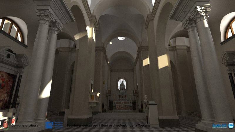 Rendering dell'interno della chiesa di San Pietro di Massa come poteva risultare intorno al 1790